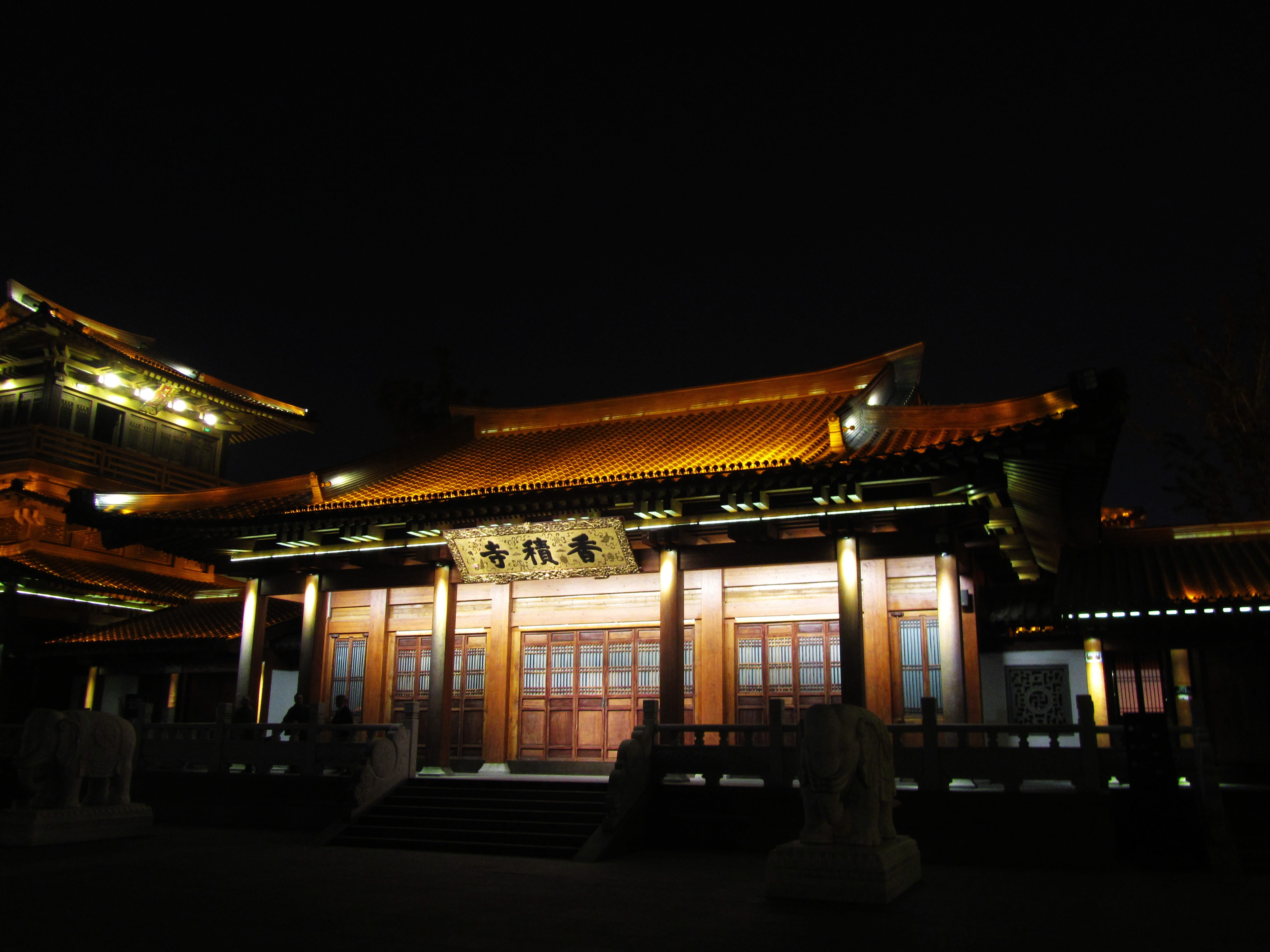 杭州香积寺，天王殿夜景。